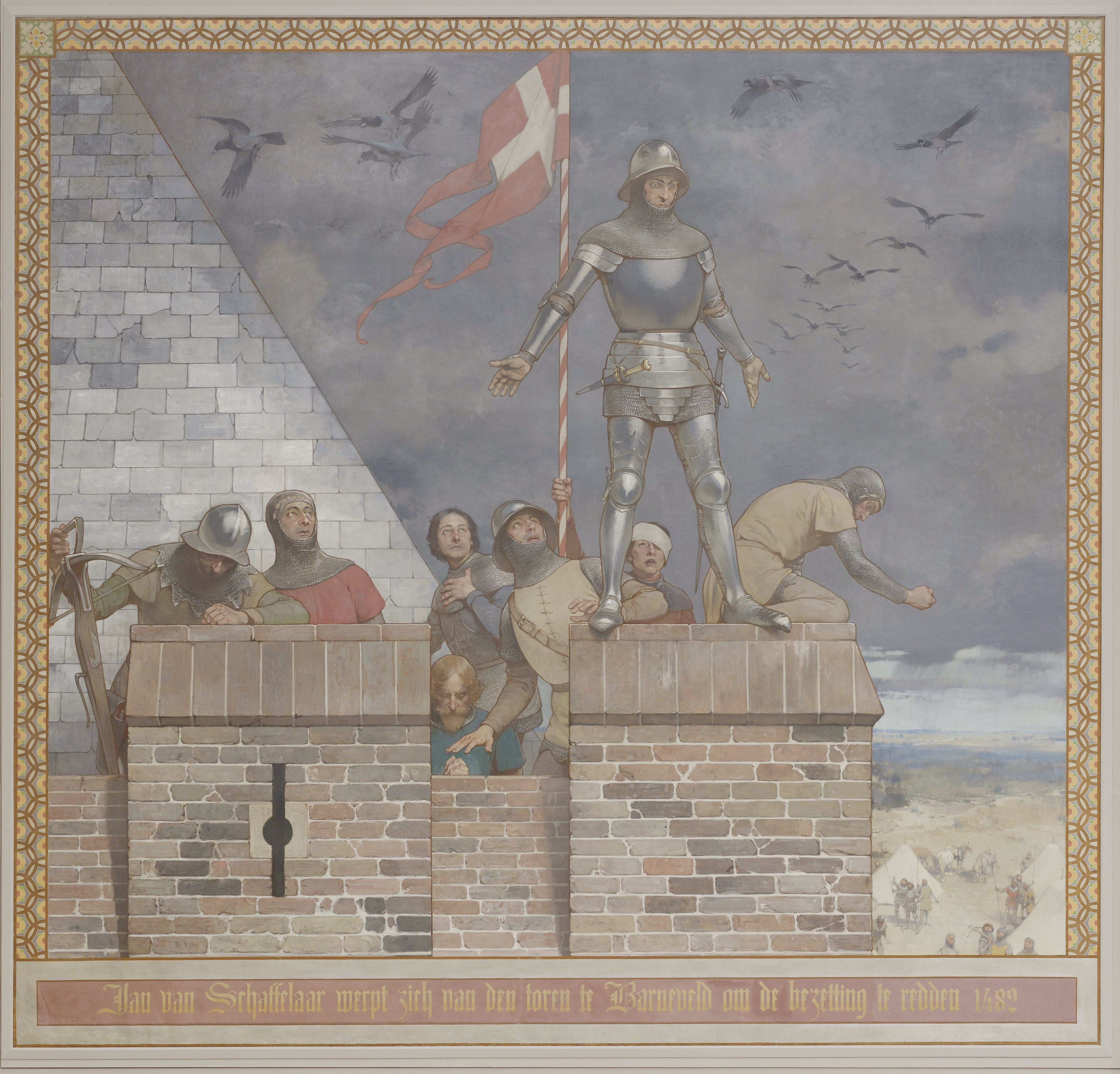 Schildering door Georg Sturm de voorstelling van Jan van Schaffelaar werpt zich van den toren te Barneveld om de bezetting te redden, aan de zuidelijke wand in de Voorhal